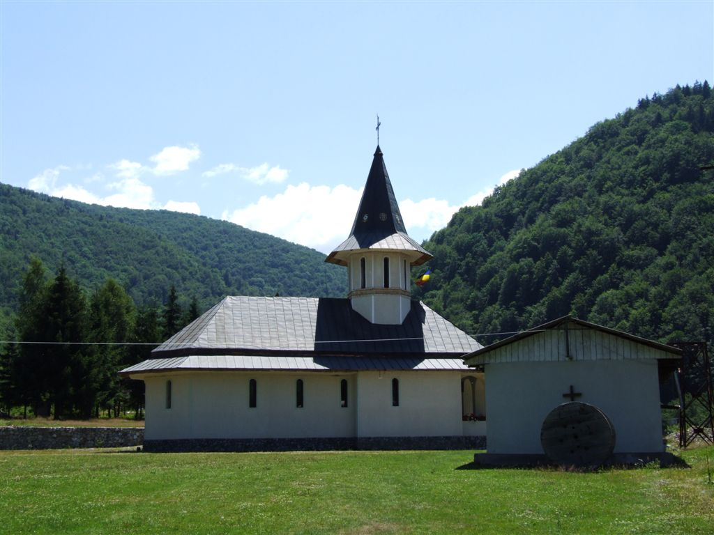 Poiana Marului - 15.07.2007